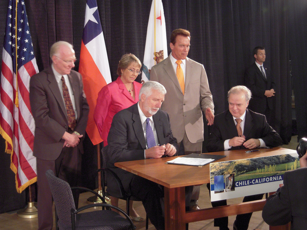 El convenio con Califonia-Davis permitirá a la industria chilena del vino y a las dos universidades involucradas asociarse con una de las instituciones más prestigiosas del mundo en investigación vitivinícola.